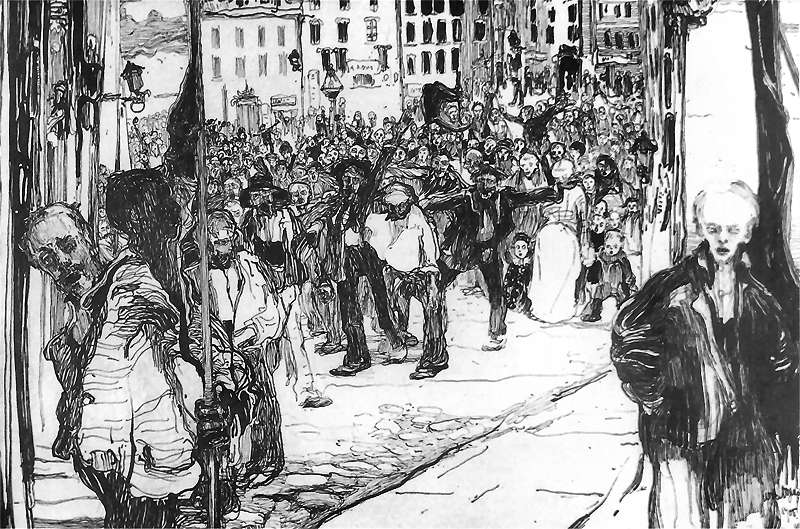 Manifestacja 1905